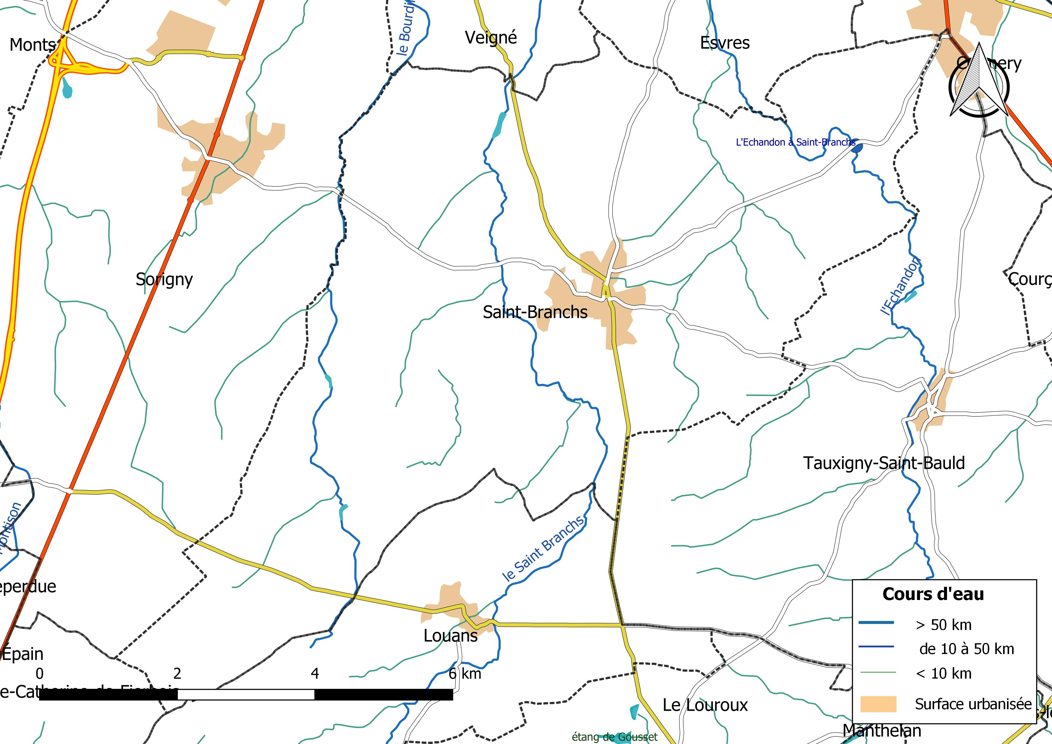 Carte du réseau hydrographique de la commune de Saint-Branchs (France).